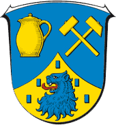 Wappen von Breitscheid (Hessen)